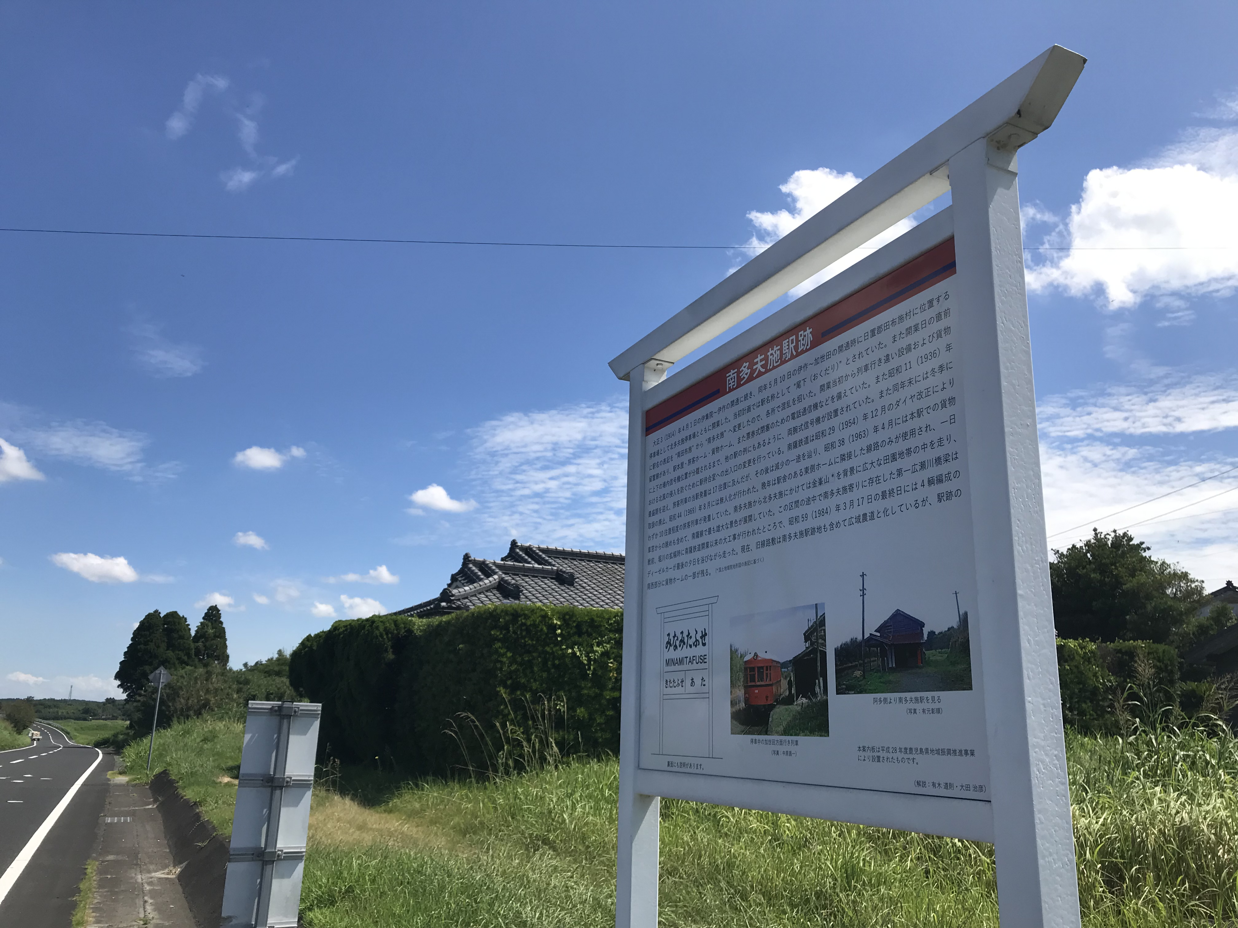 南多夫施駅跡に建てられた南多夫施駅跡記念碑